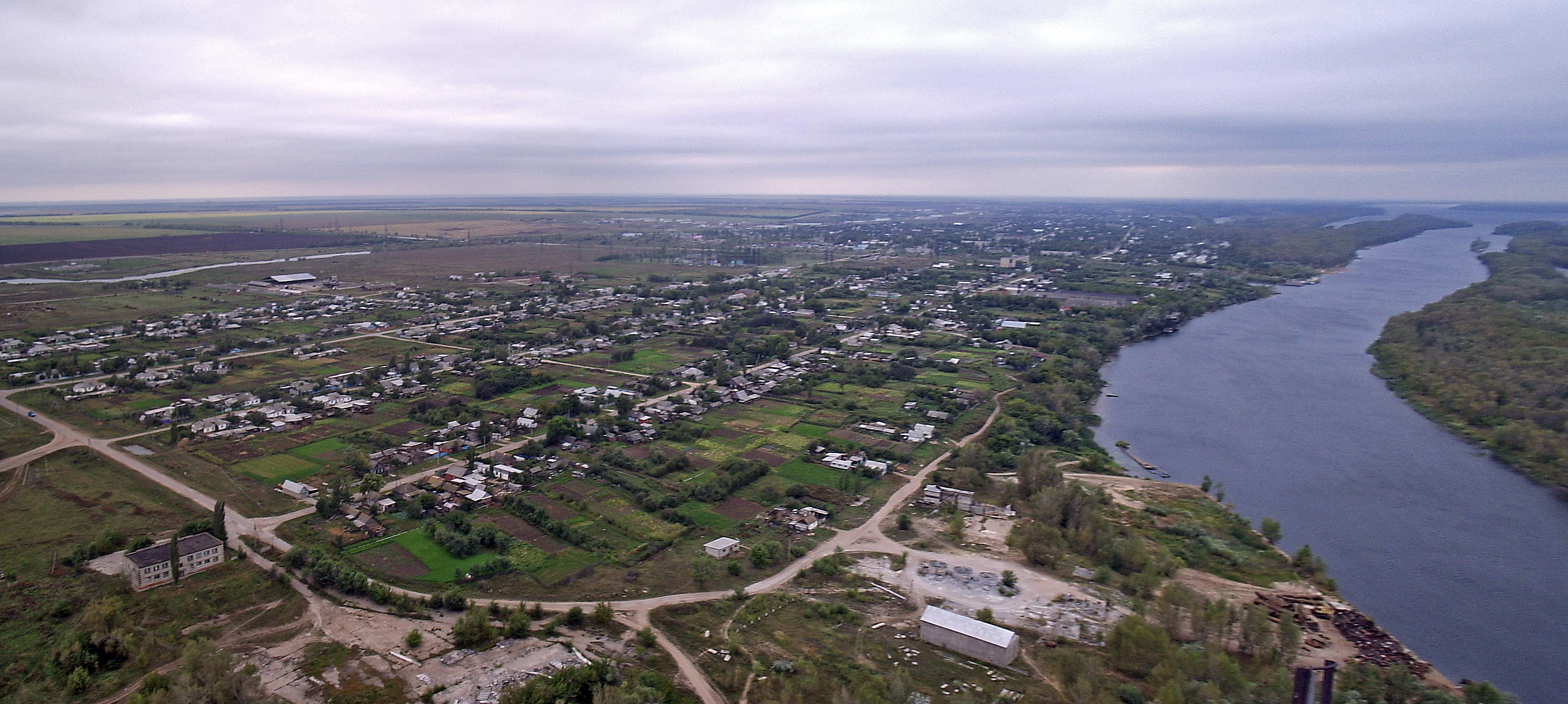 Mikhaylovka (Remler) / Михайловка (Ремлер)